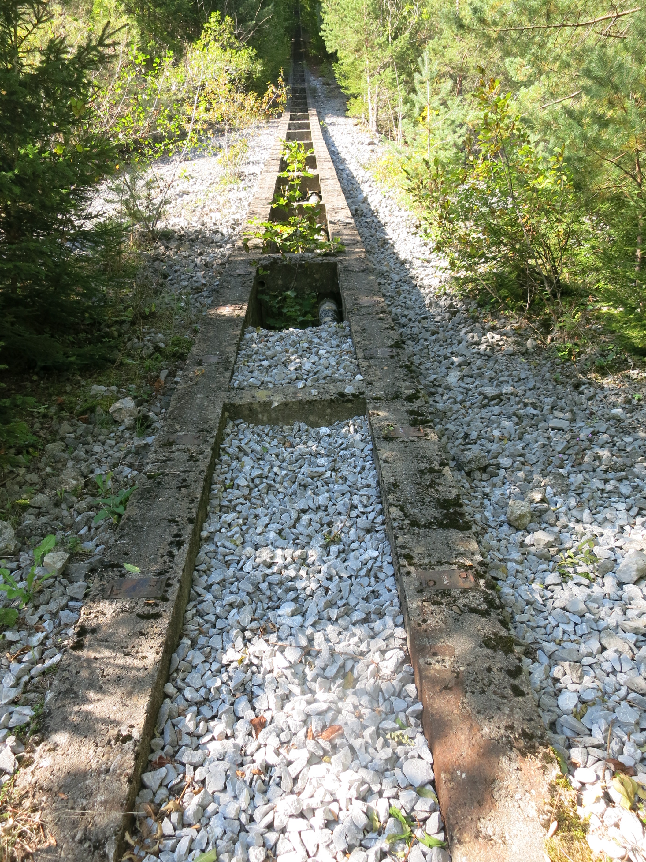 Sperrstelle Wimmis BE, Schweiz: Trasse der ehemaligen Standseilbahn in das Artilleriewerk Burg